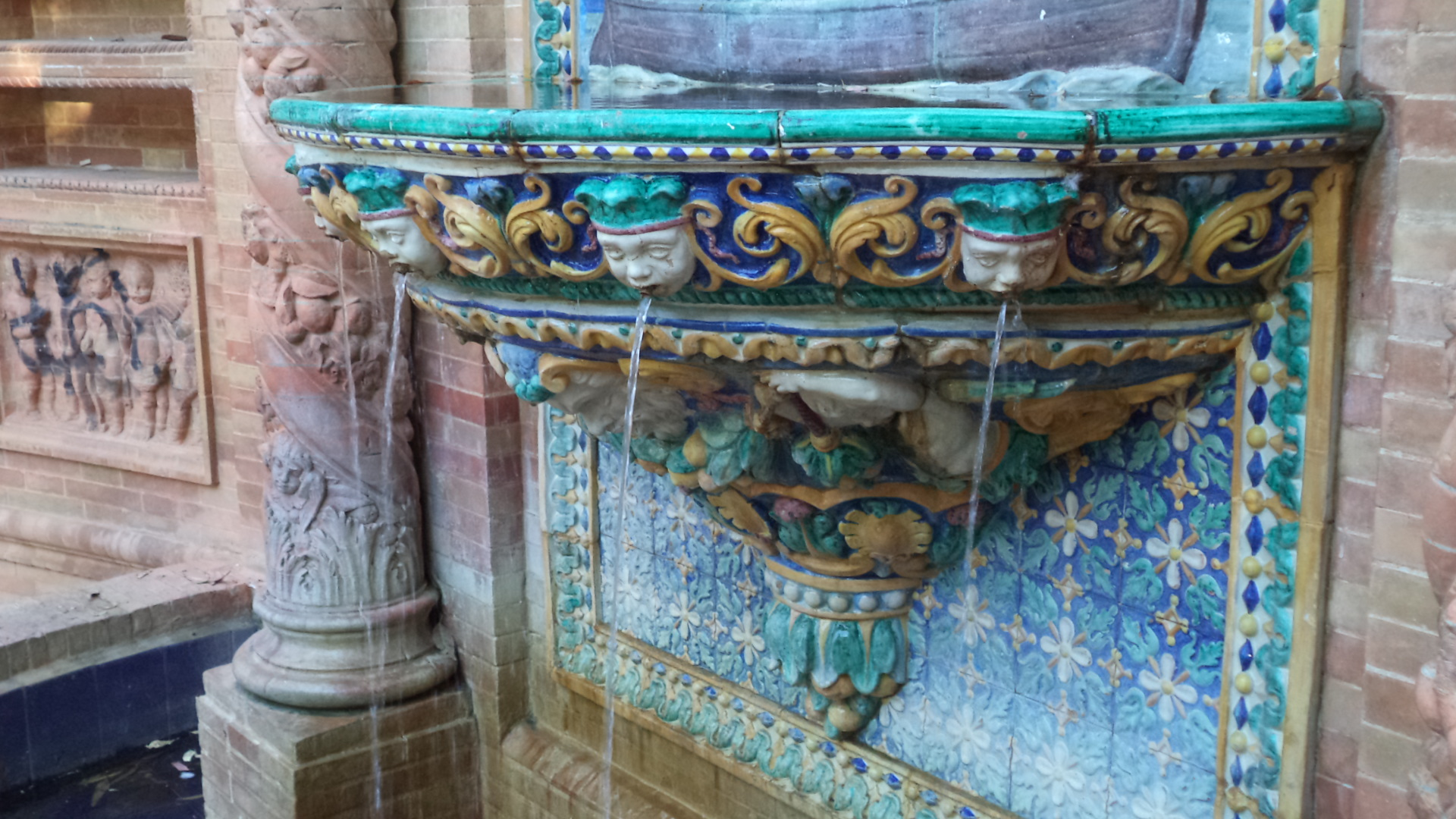 Glorieta de los hermanos Álvarez Quintero en el Parque de María Luisa. Sevilla